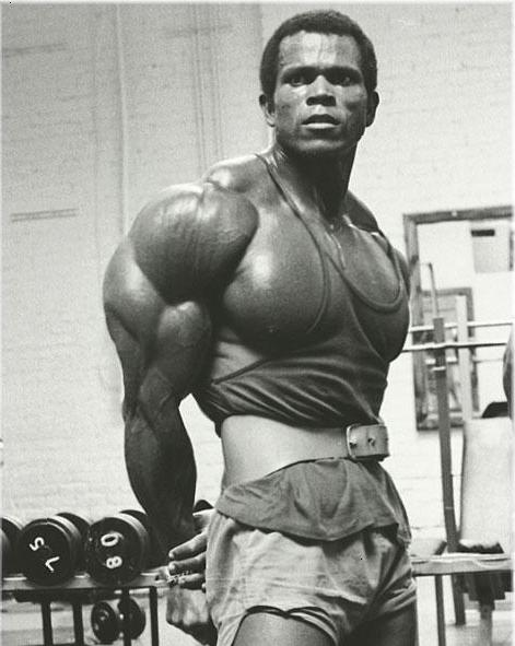 Den franska kroppsbyggaren Serge Nubret